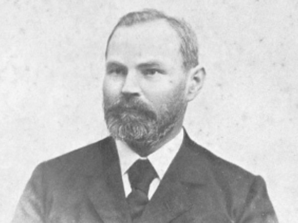 Topič Alois (1852-1927), český cestovatel